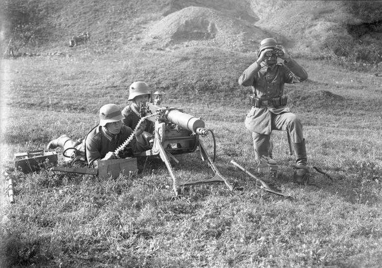 1931 Reichswehr Manöver in Königshofen/Franken MG-Nest im Gelände, mit beobachtendem Truppenführer